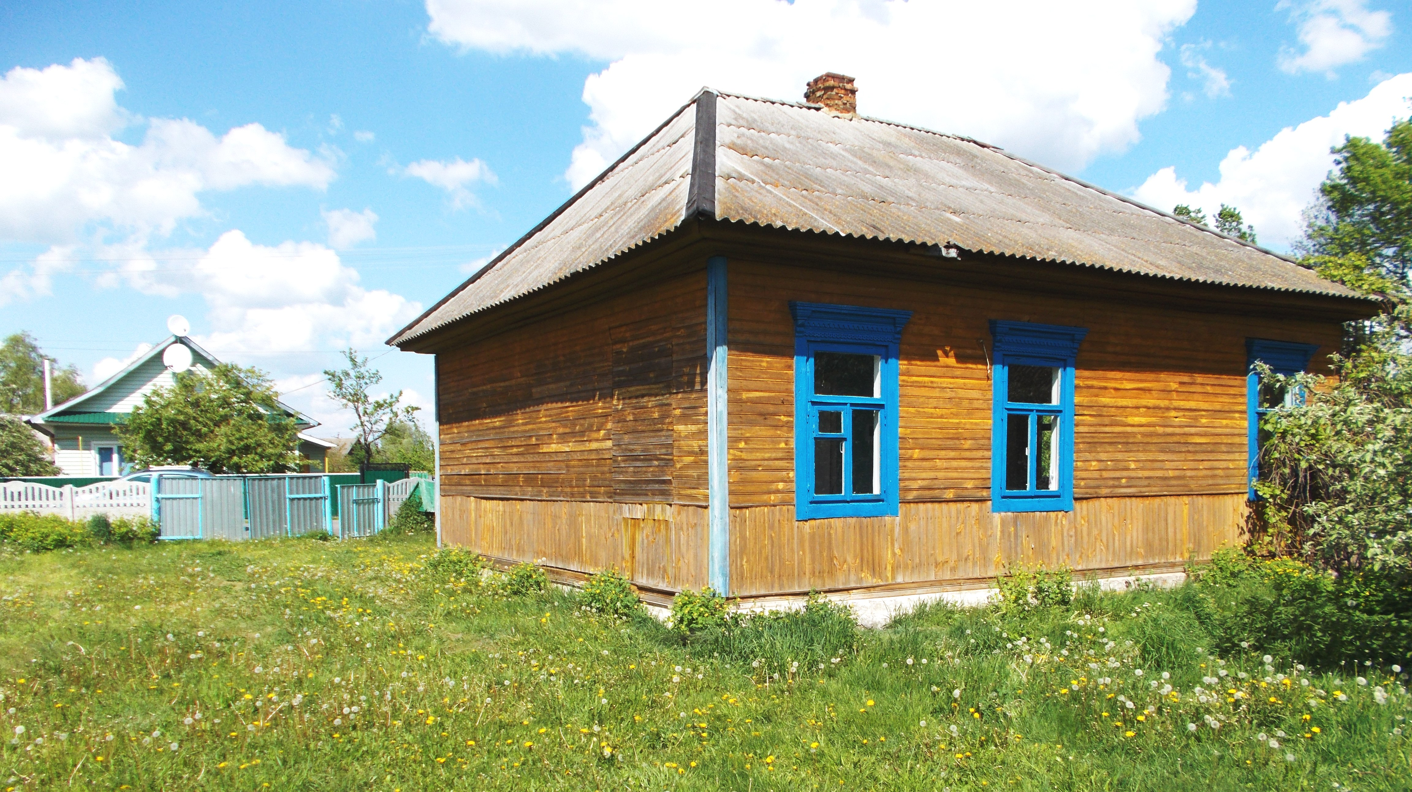 Дом Хаима Вейцмана в городе Мотоль. Переулок Банный, дом 1.